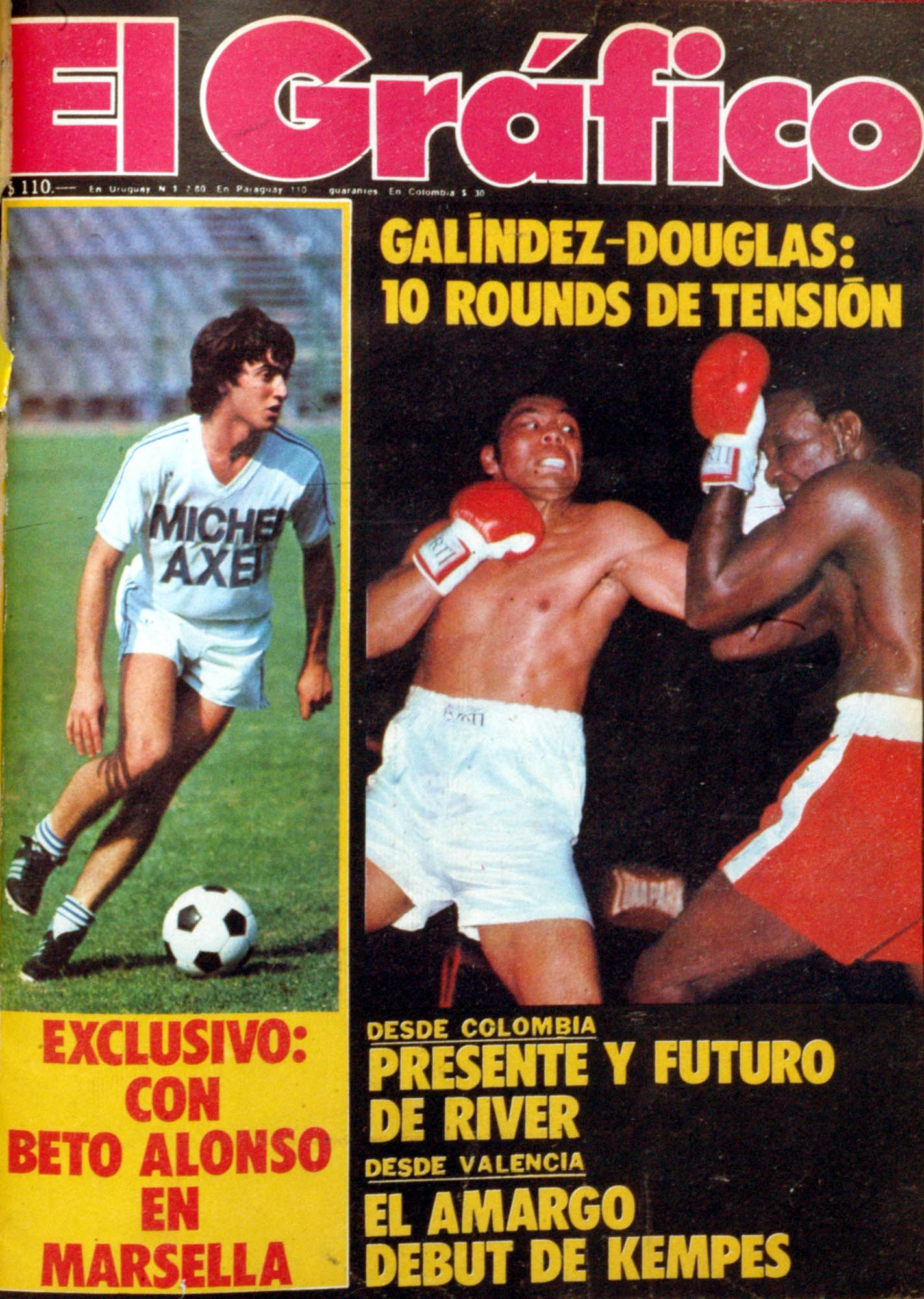 El Grafico del 24 de Agosto de 1976. Edicion 2968